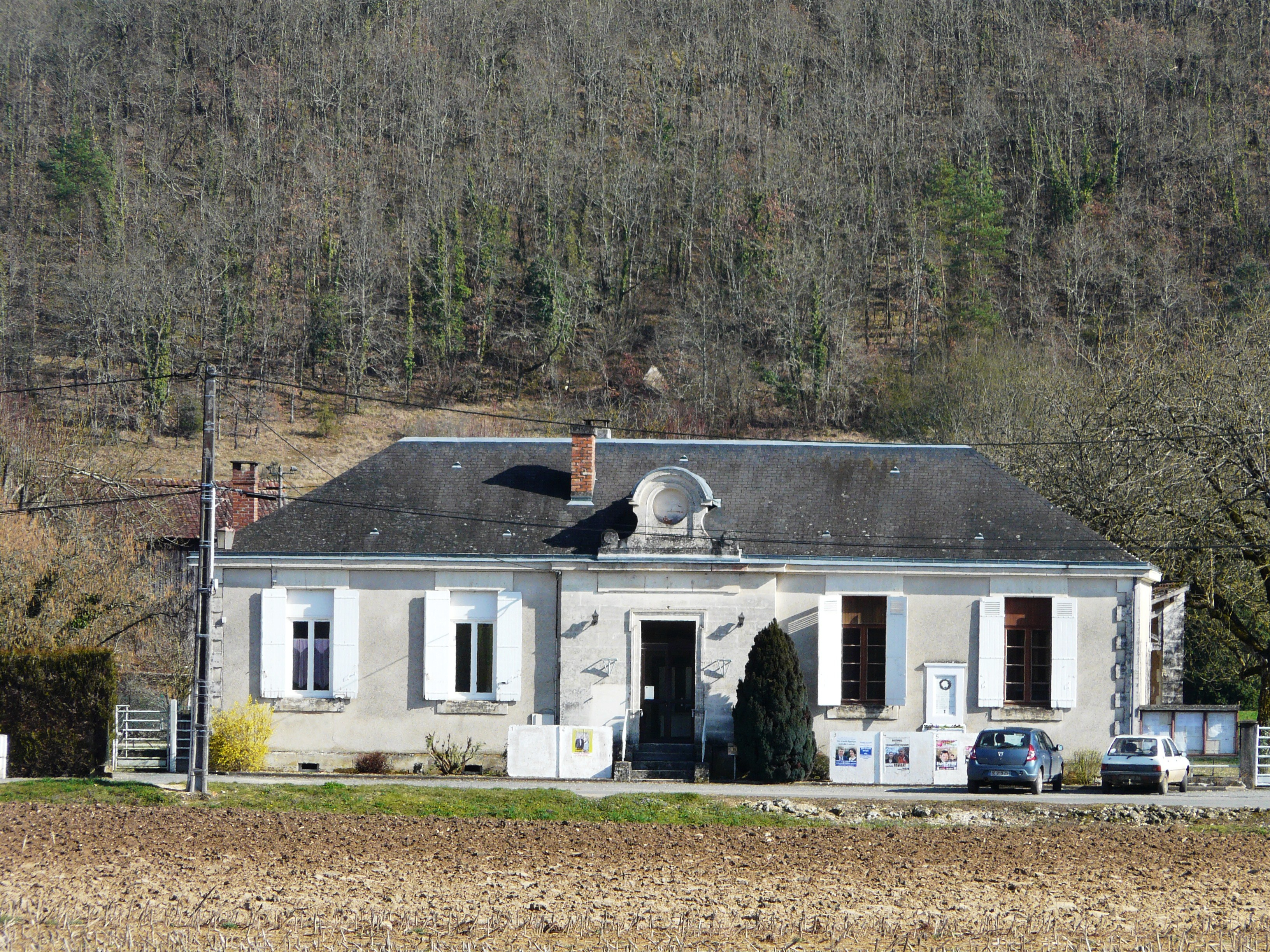 La mairie de Saint-Vincent-sur-l'Isle, Dordogne, France.